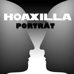 Logo des Podcasts Hoaxilla-Porträt